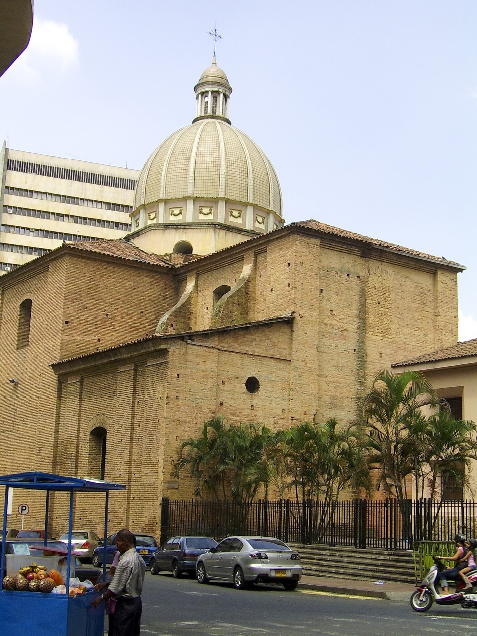 Parte trasera Iglesia de San Francísco, Cali, Colombia